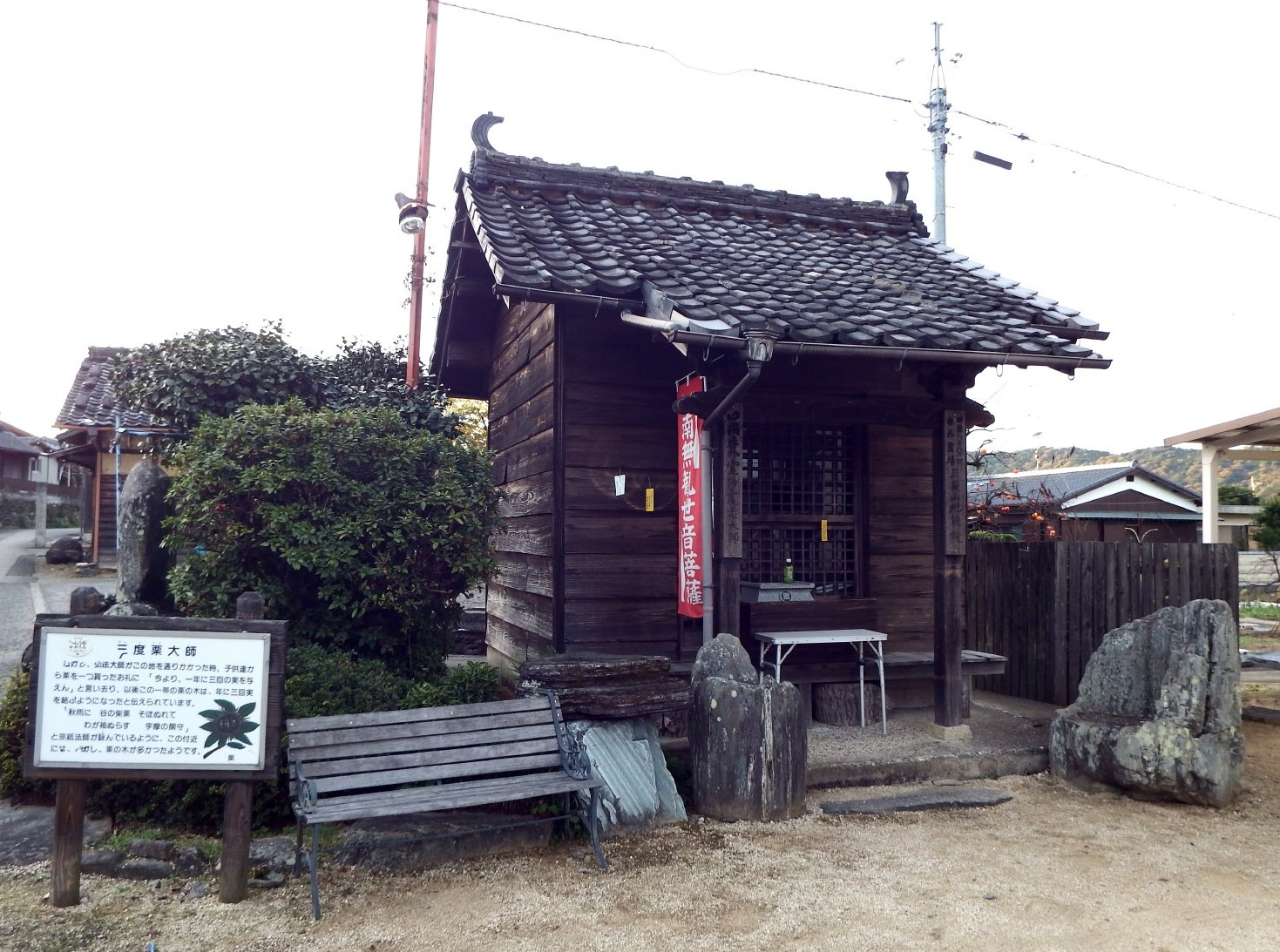 三度栗大師（四国中央市）